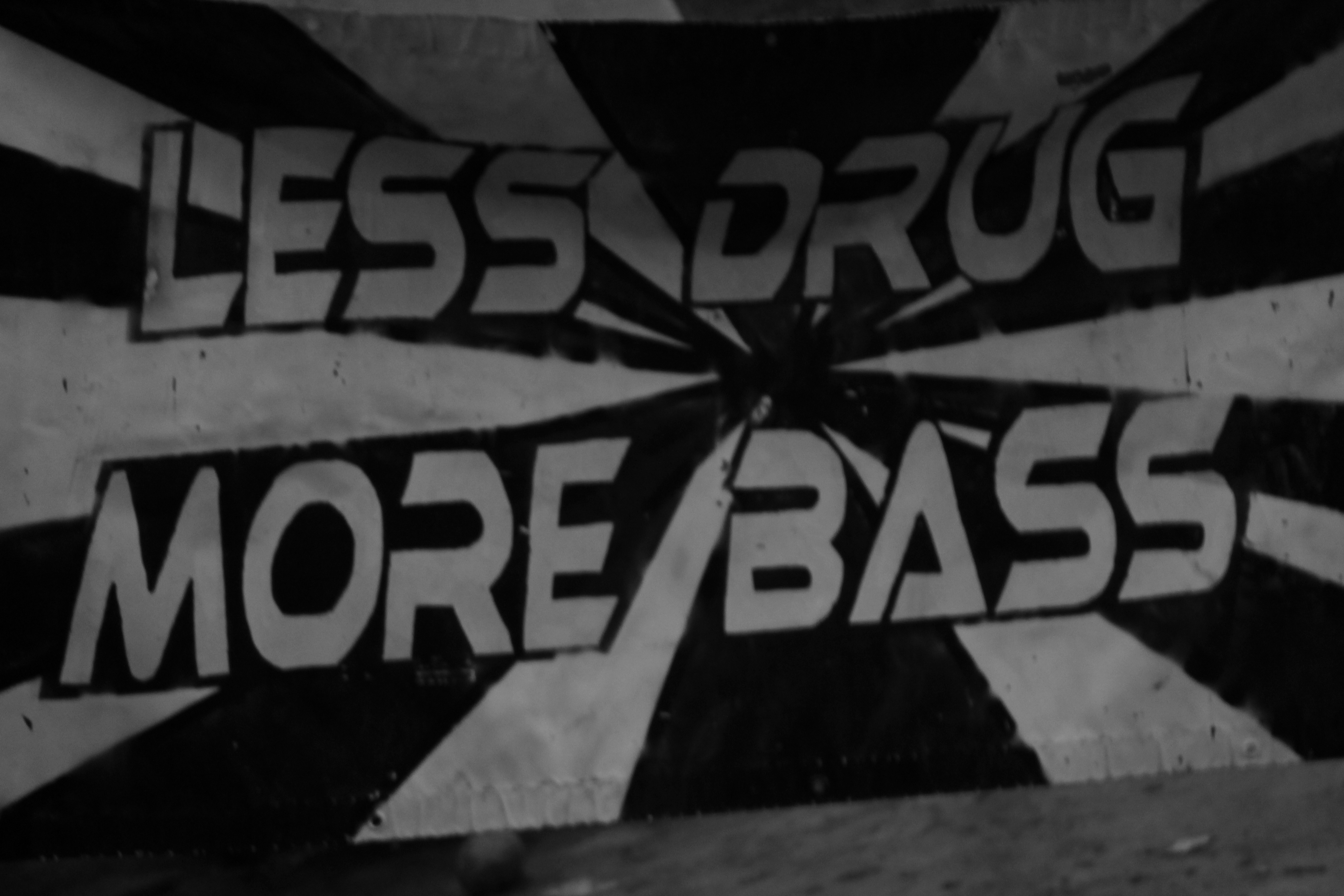 Un cartellone esposto durante un Free party: Less Drugs, more bass